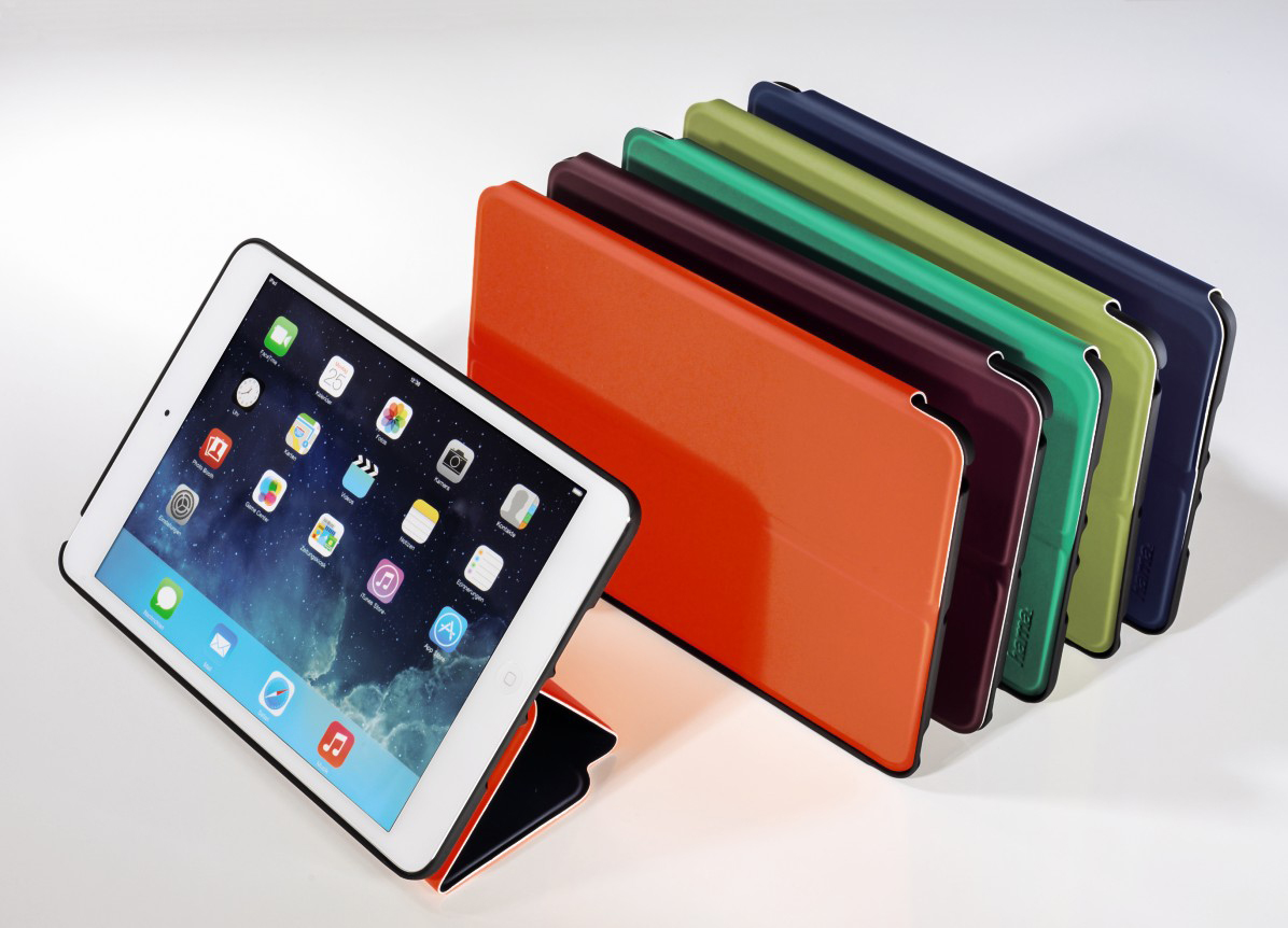 Hama Twiddle